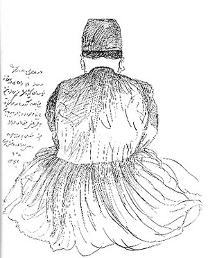 Mohammad Hassan Khan Etemad al-Saltaneh, Pen-and-ink drawing by Naser al-Din Shah, 10 November 1873.